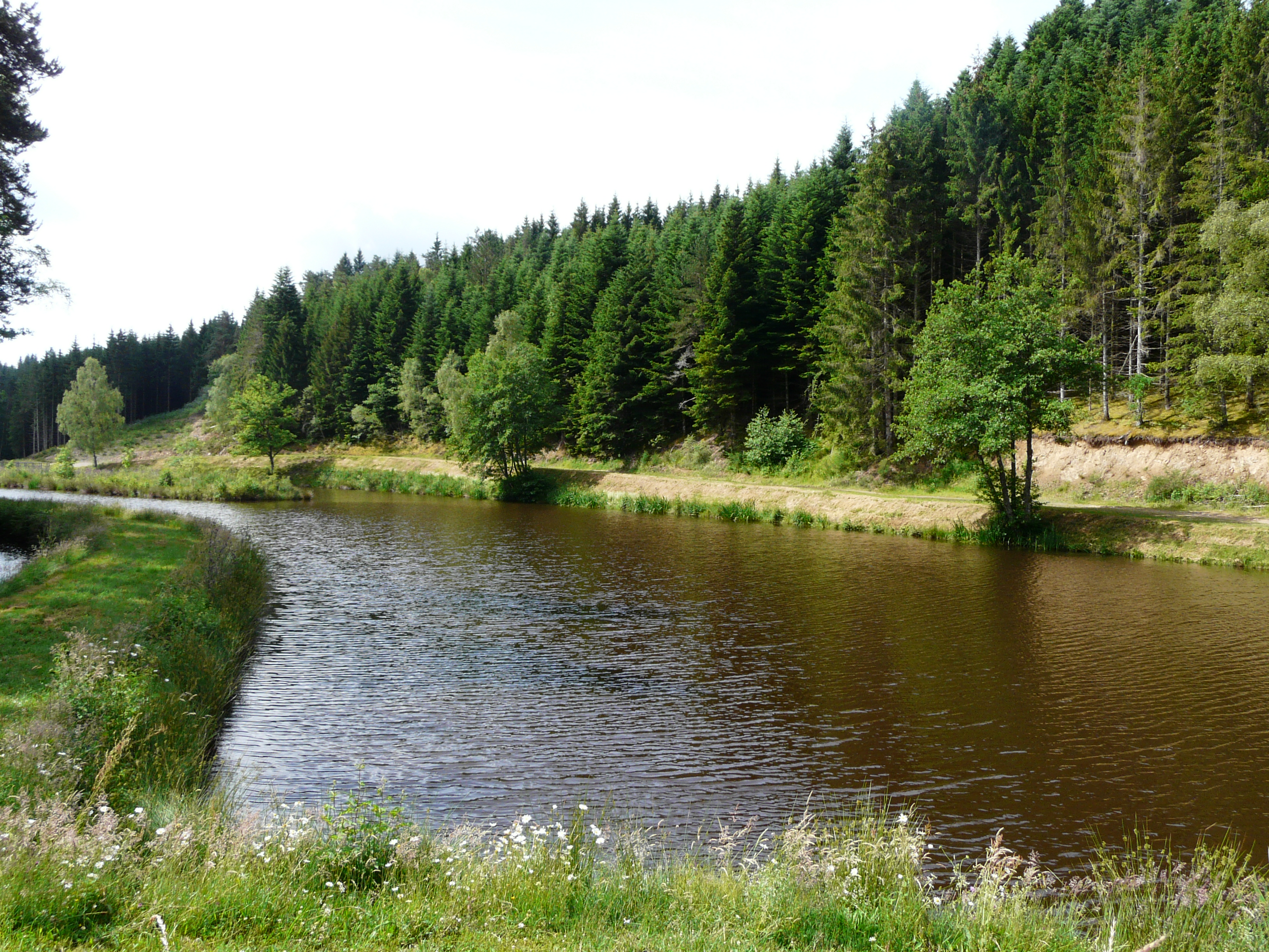 L'étang alimenté par le Dognon (bras occidental) en aval de la route départementale 159, Saint-Étienne-aux-Clos, Corrèze, France.